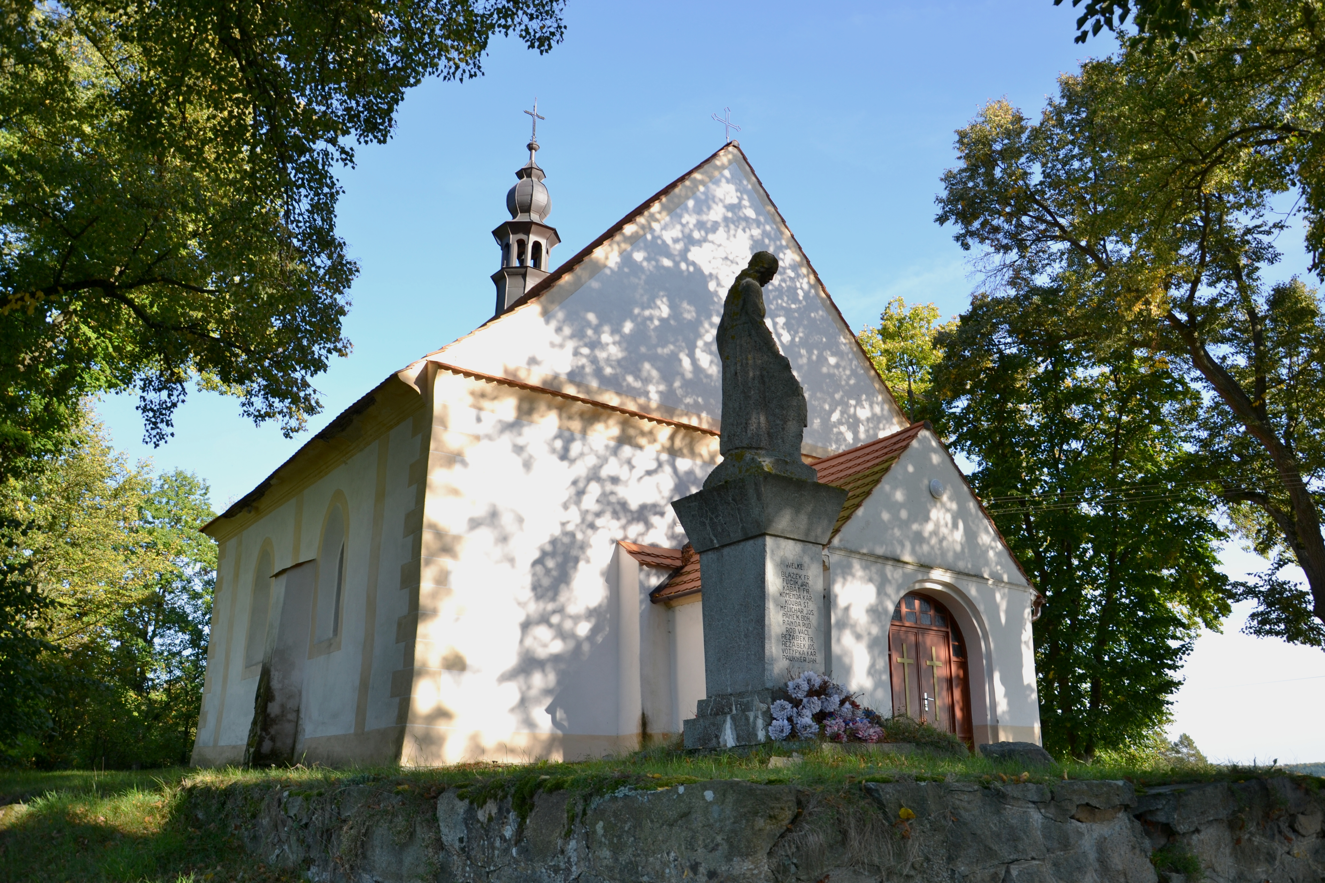 POUTNÍ KOSTEL SV. JANA KŘTITELE A PANNY MARIE (KVĚTOV). Pozdně gotická jednolodní stavba z roku 1567 s pětibokým závěrem se sakristií na jižní straně a předsíňkou před západním průčelím. Loď plochostropá, hrotitý triumfální oblouk, plochostropý presbytář. Od středověku poutním místem.